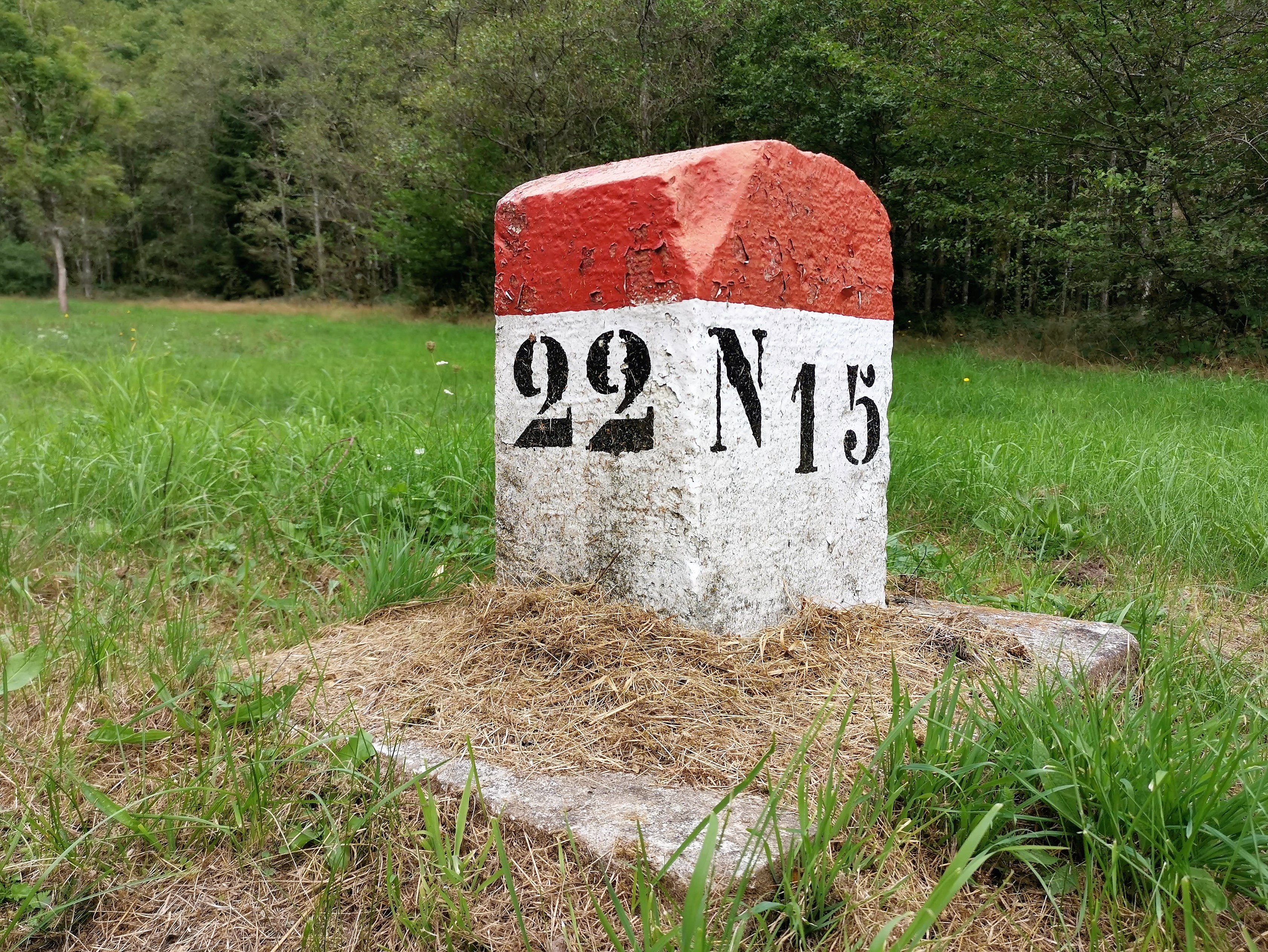 Borne kilométrique N15 entre Heiderscheidergrund et Büderscheid, section cadastrale de Goesdorf.